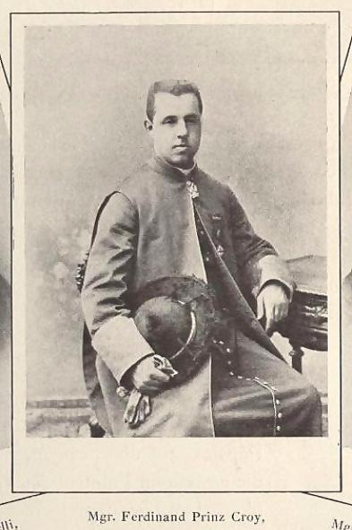 Prinz Ferdinand de Croÿ (1867-1958) katholischer Priester, päpstlicher Diplomat und Kammerherr